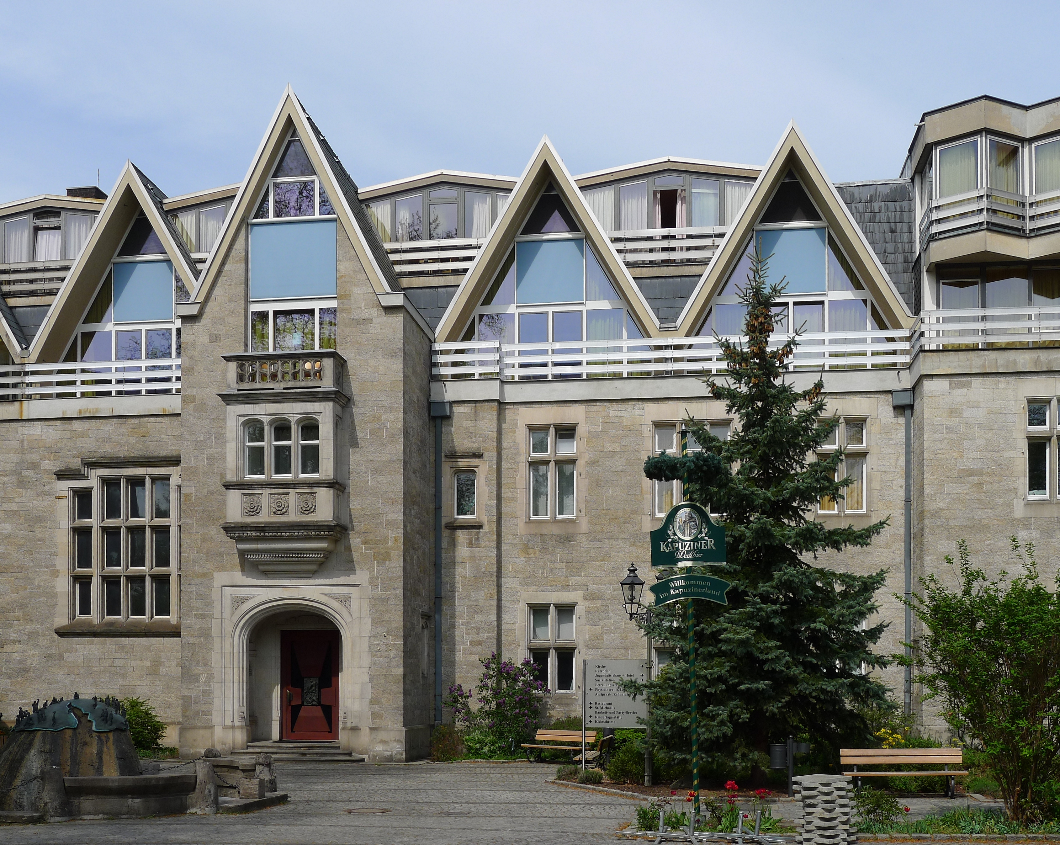 Palais